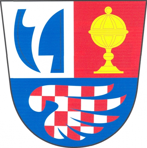 Obecní znak obce Jinačovice